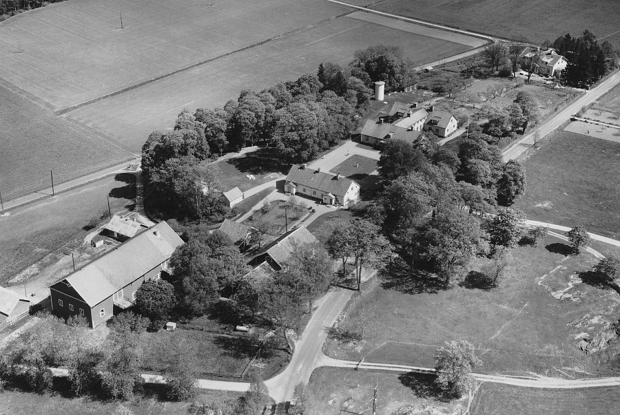 Flygfoto över Mölnbo och Edesta Lanthem och Husmodersskola.